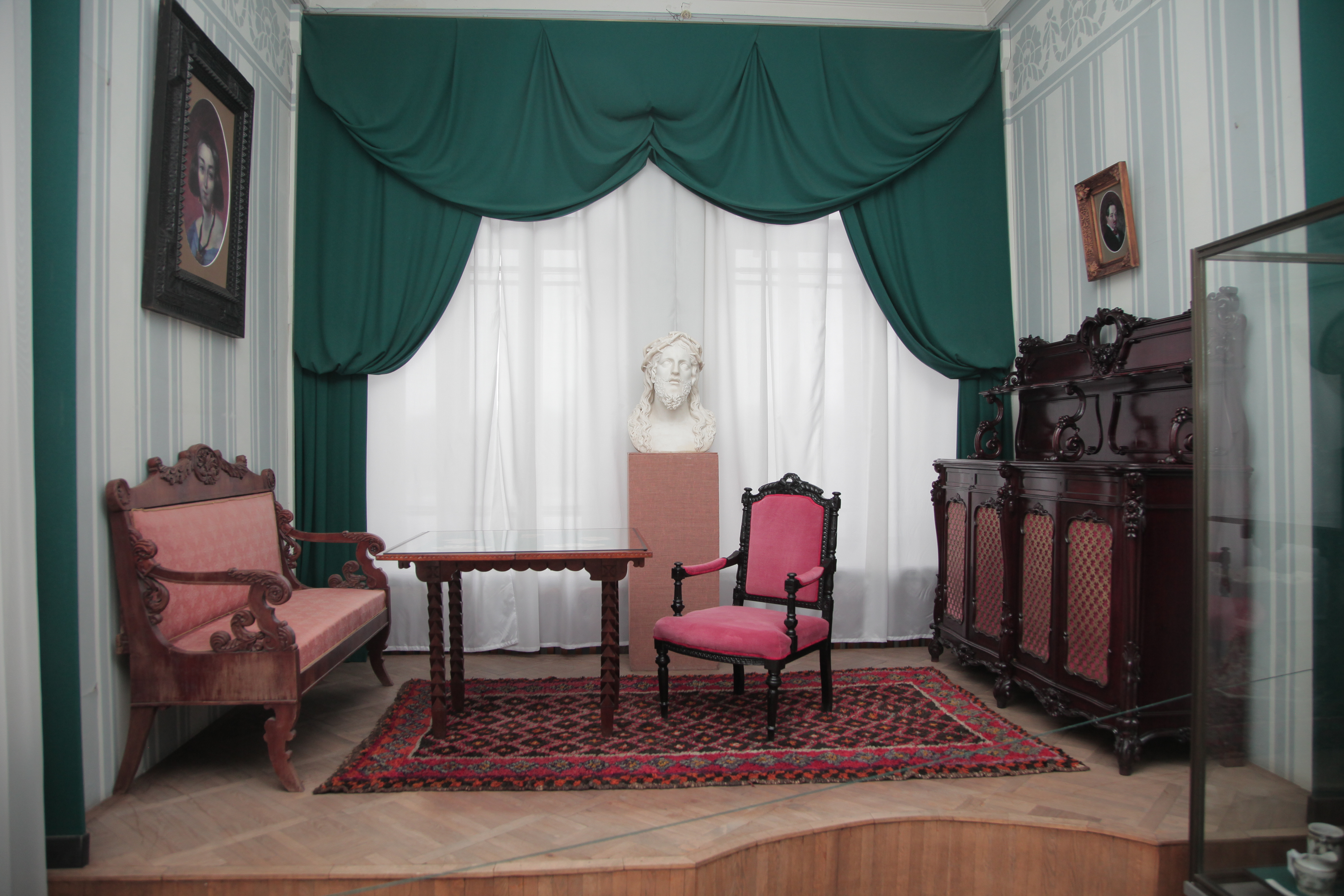 Полтавський кразнавчий музей_Зал 12